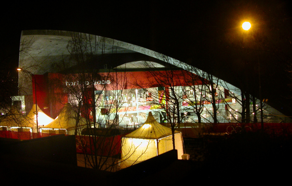 Palazzo a vela, XX Olimpiade Invernale, Torino it:2006. Foto by Stefano Trezzi, da me scattata e rilasciata secondo la licenza indicata.